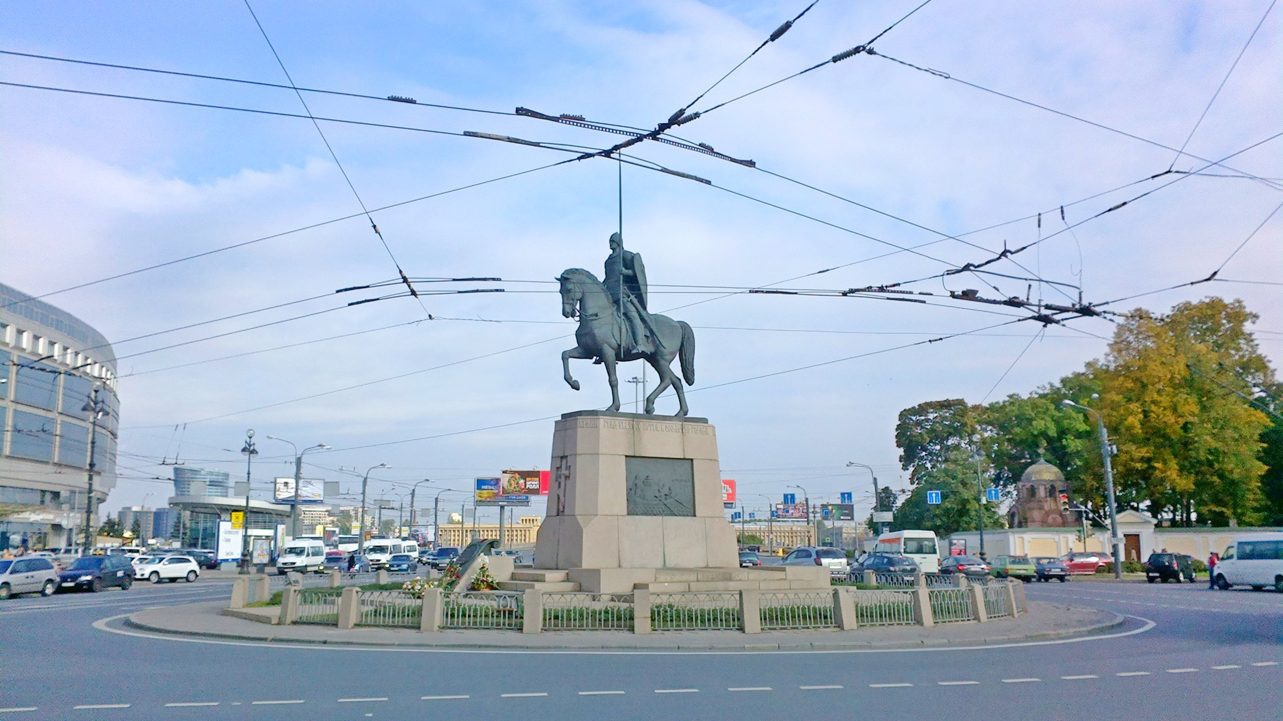 Площадь Александра Невского. Памятник Александру Невскому